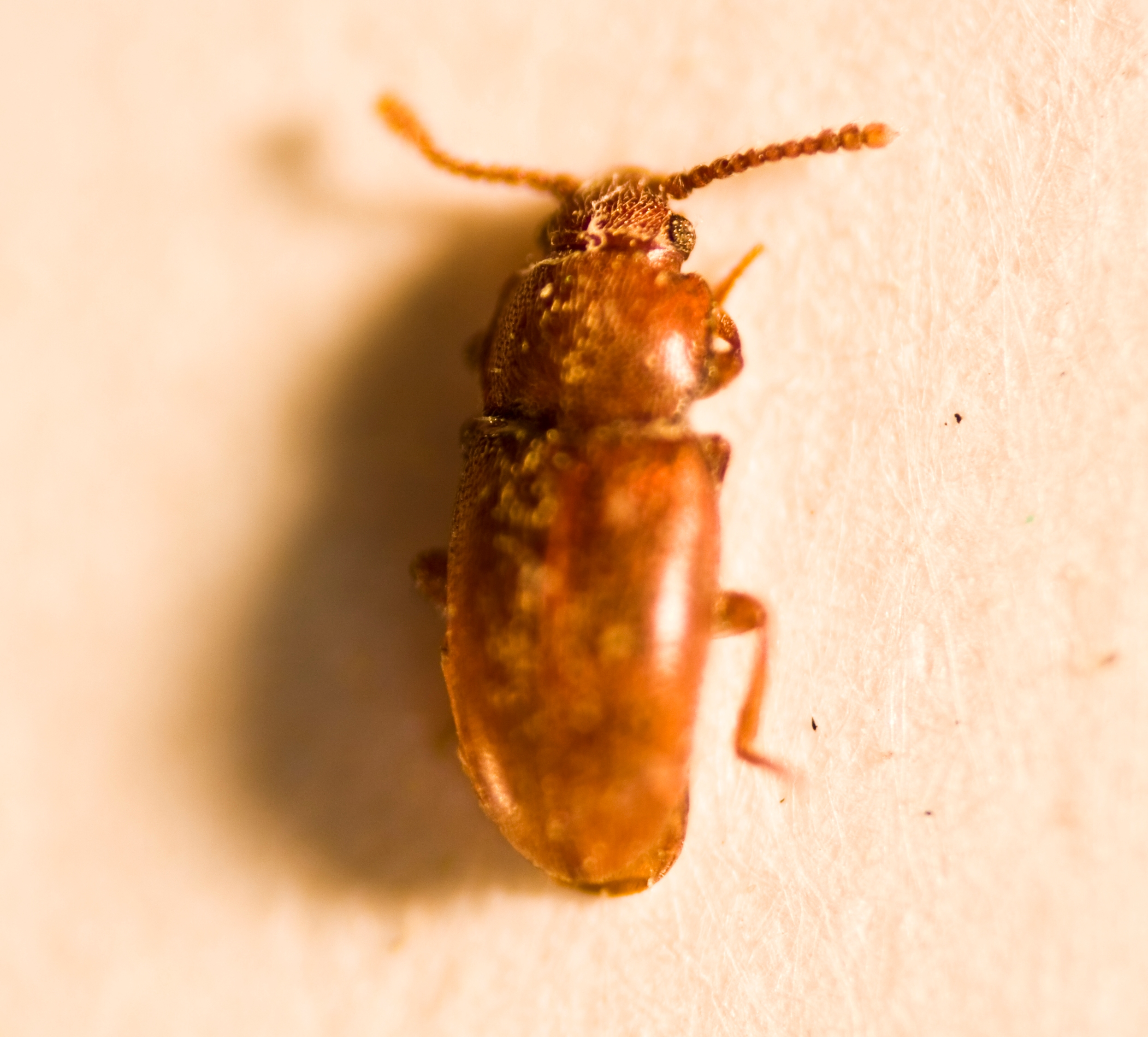 Cryptophagus lemonchei. Paratipo. Colección B. Lemonche